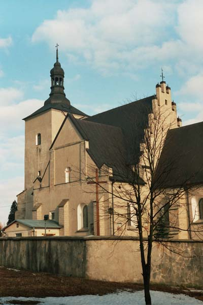 Kościół parafialny pod wezwaniem św. Michała Archanioła w Łagowie w woj. świętokrzyskim.